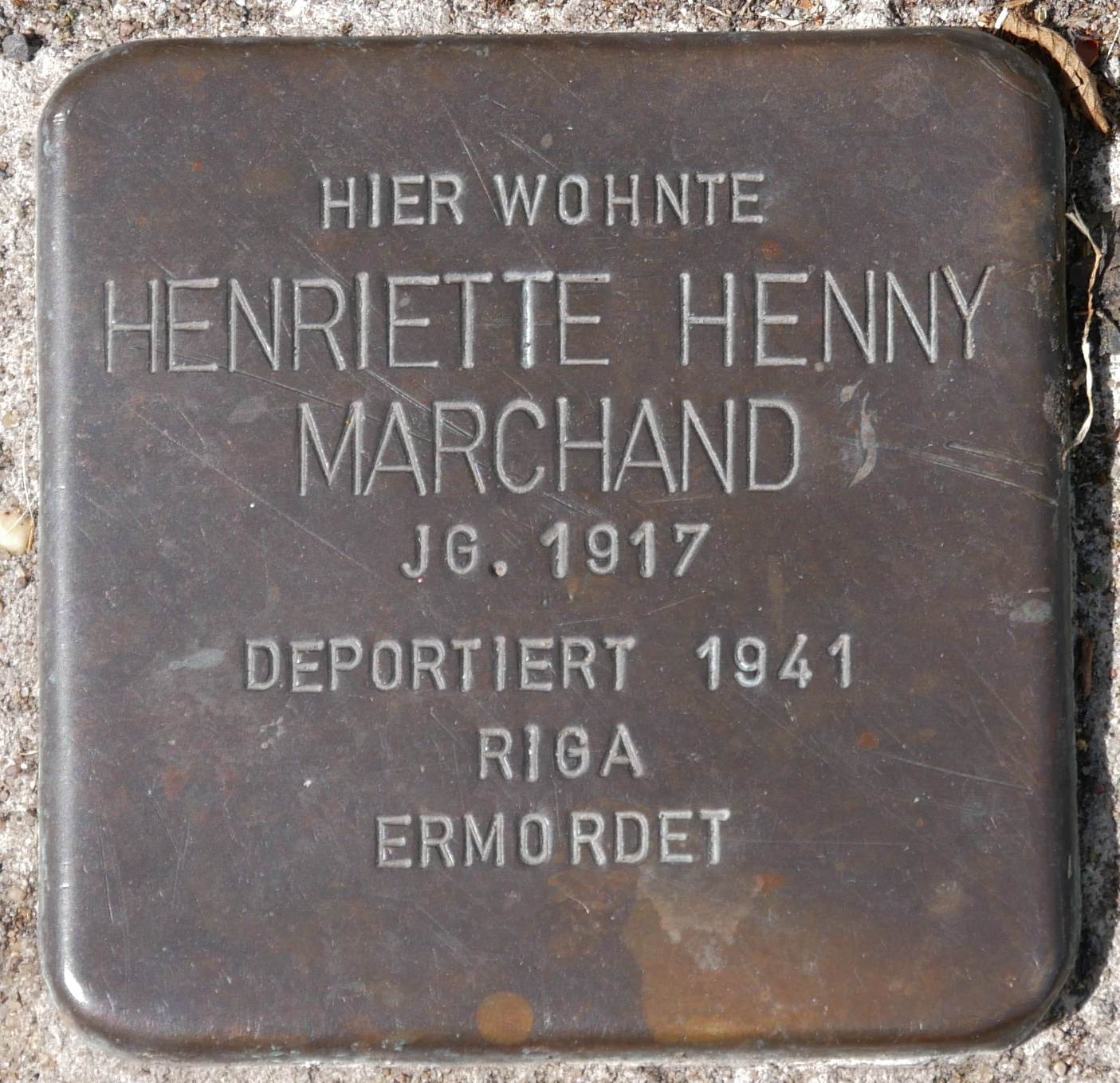 Stolpersteine Wesel: Marchand, Henriette Henny